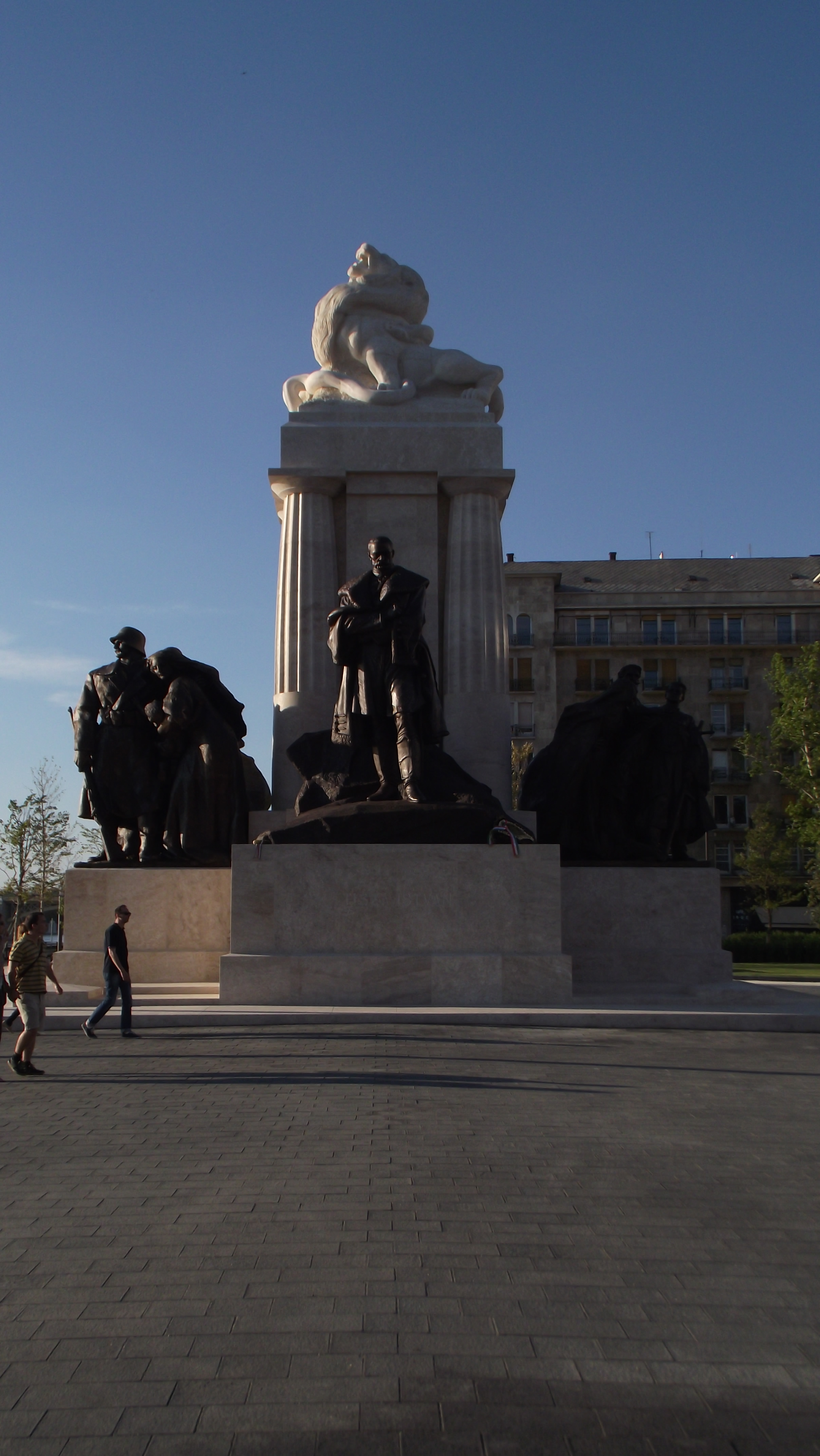 2014 nyarán átadott Gróf Tisza István szobra a budapesti Kossuth Lajos téren